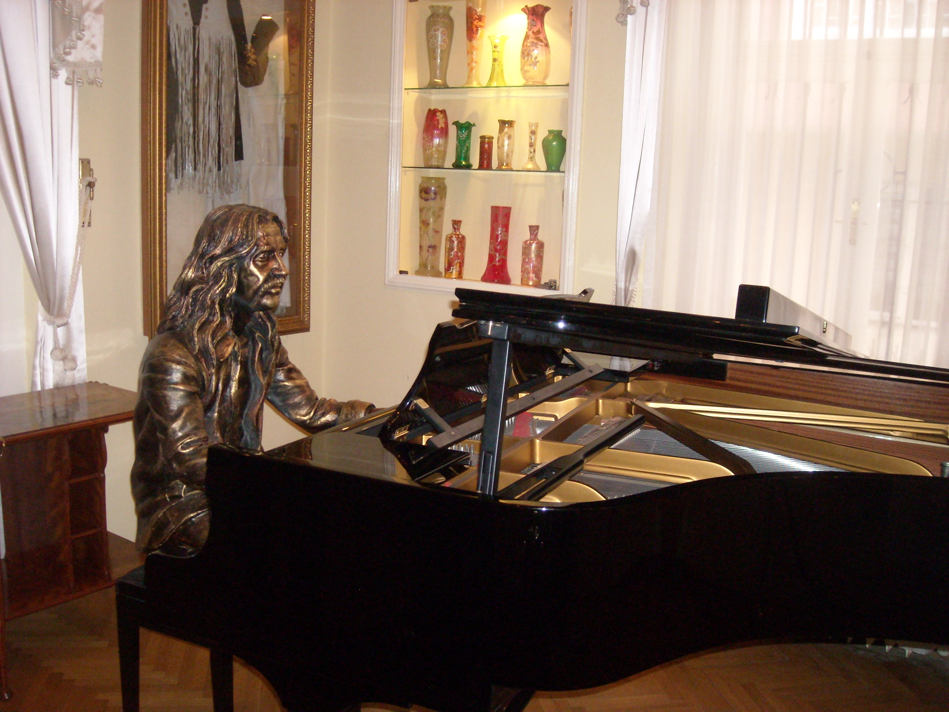 Barış Manço Müzesi (museum)